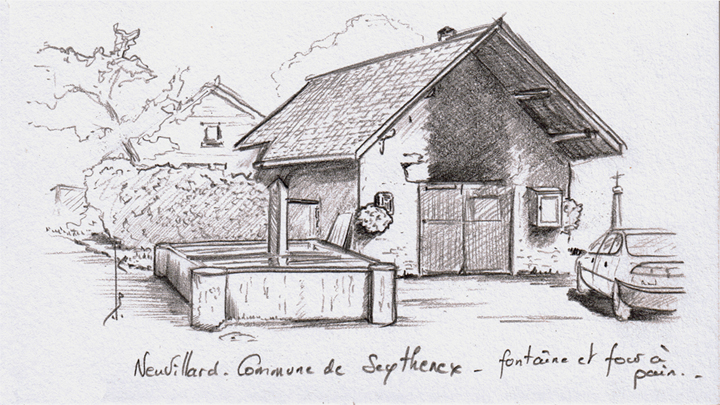 Fontaine et four à pain de Neuvillard (Seythenex)